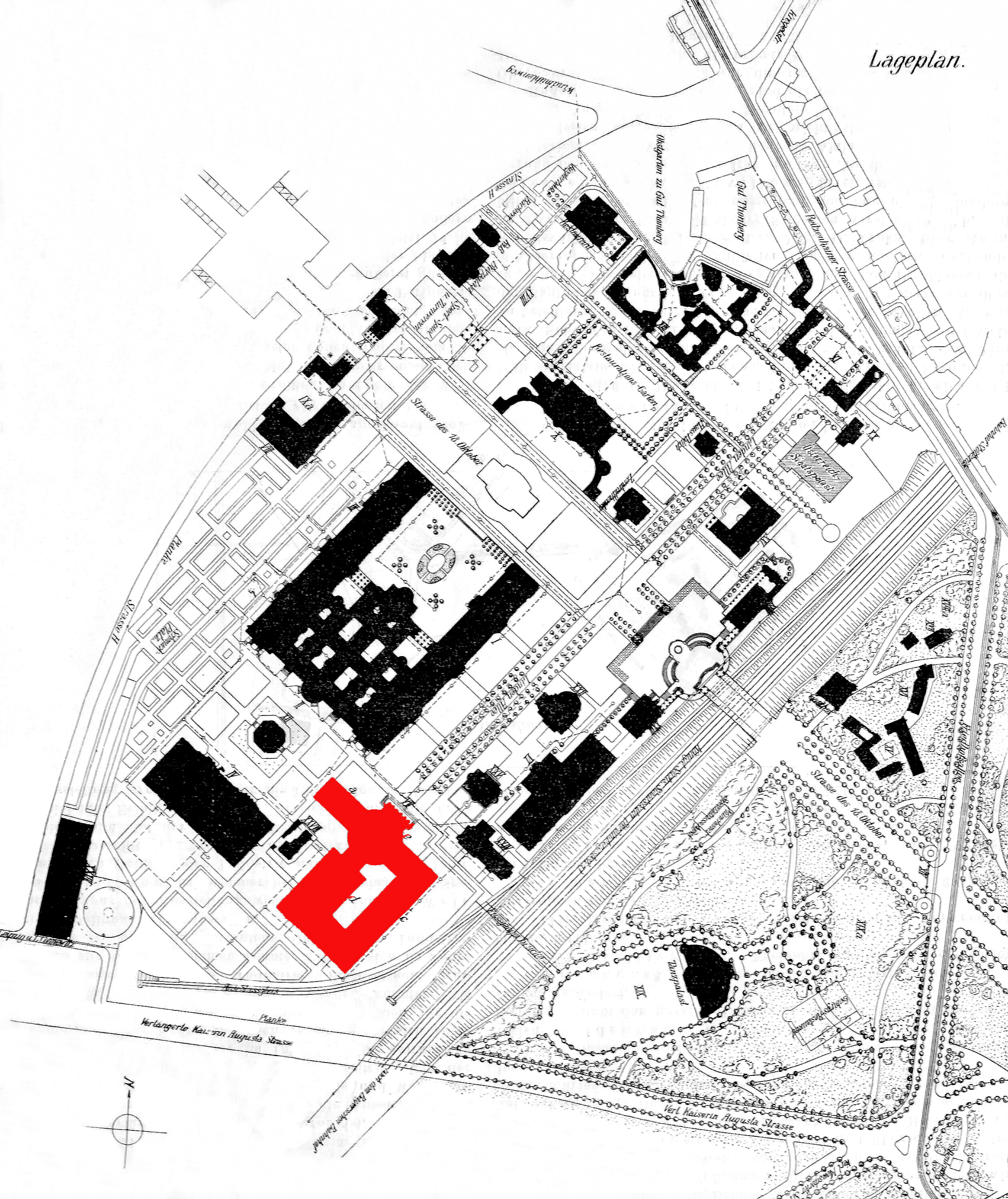 Eventpalast Leipzig im Lageplan der Internationalen Baufachausstellung (IBA) 1913